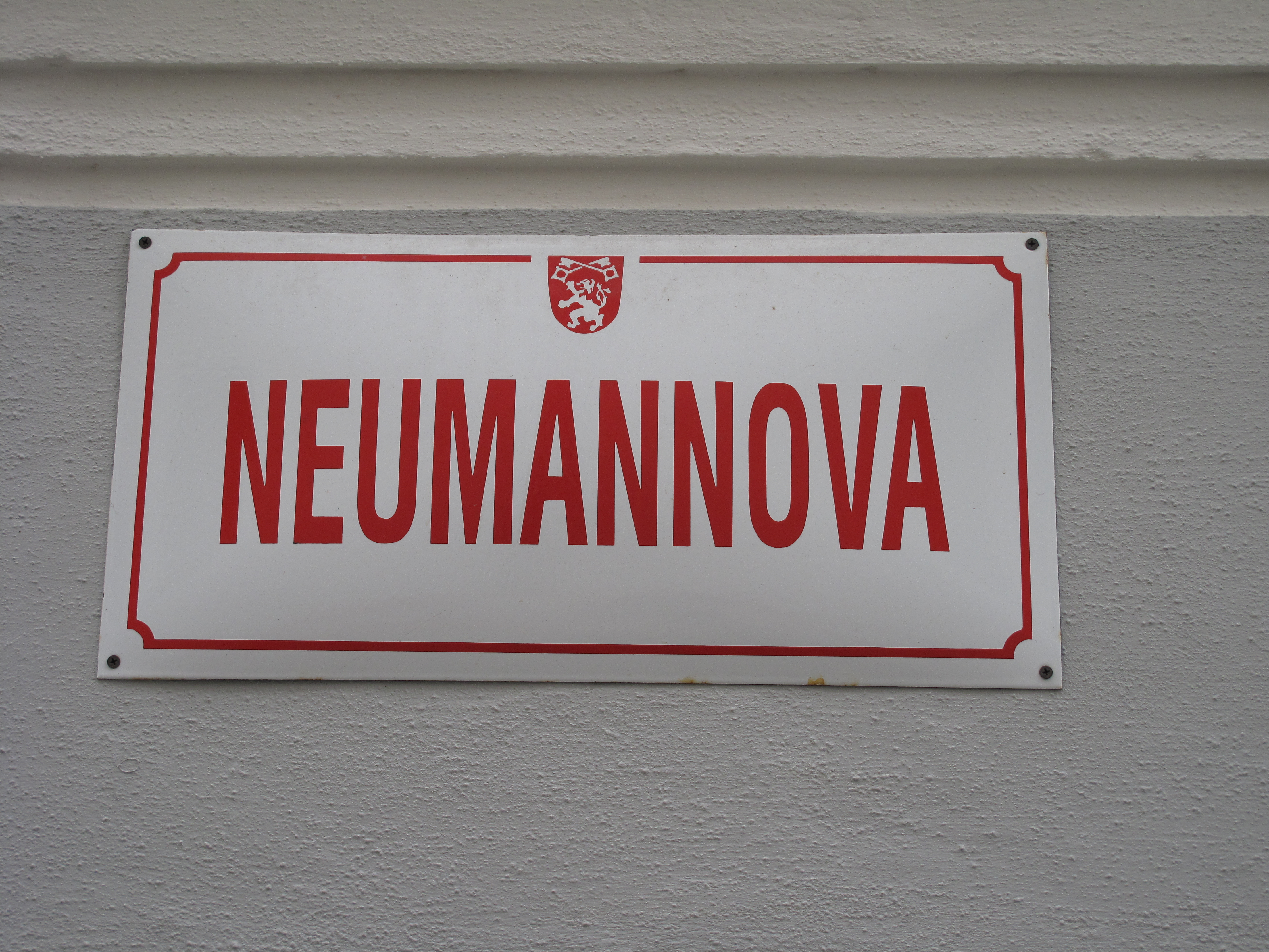 Ulice Neumannova v Prachaticích. Česká republika.